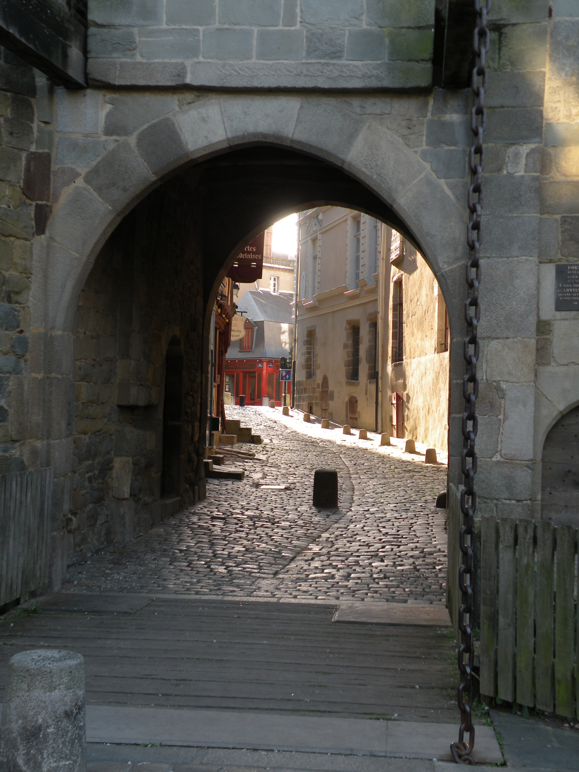 La rue des Portes Mordelaises de Rennes au petit matin.